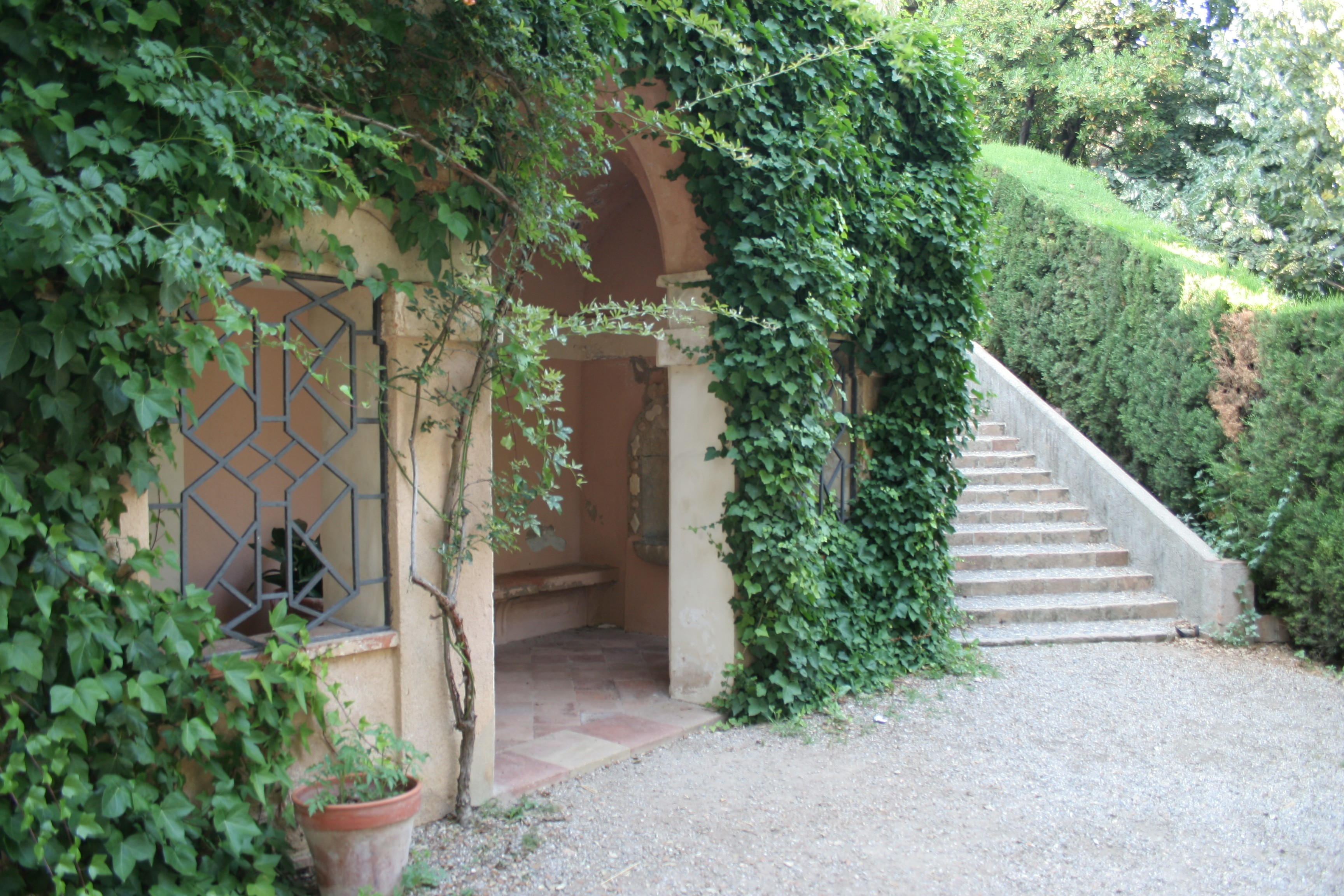 Jardines del siglo XVIII